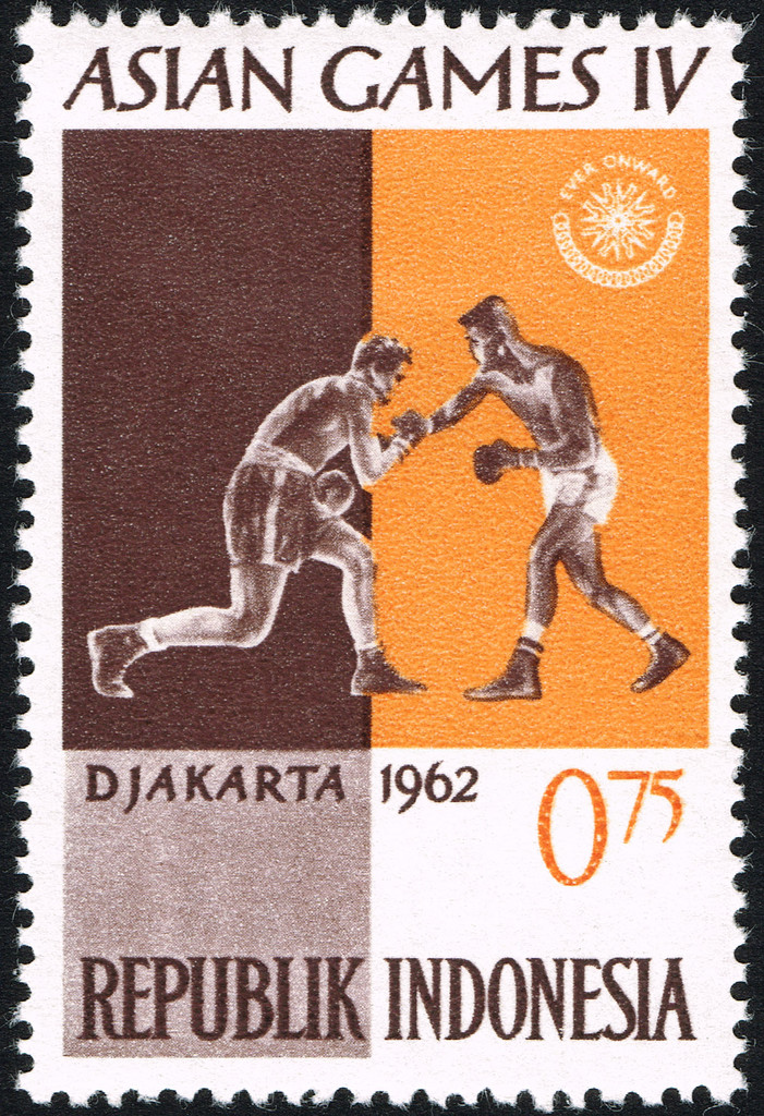 Asian Games IV